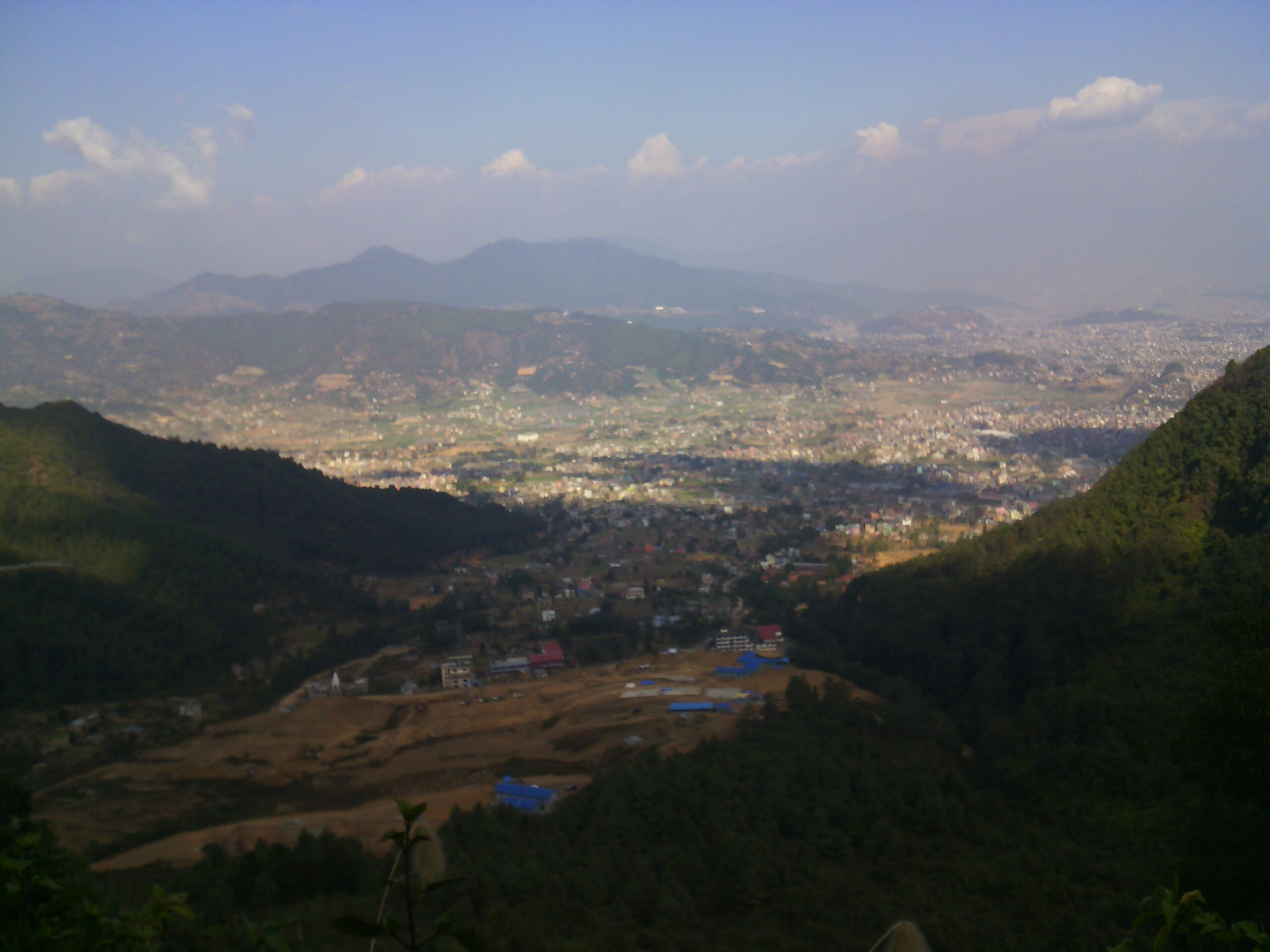 नेपाली: चन्द्रागिरीबाट देखिएको काठमाण्डौ उपत्यकाको दृष्य